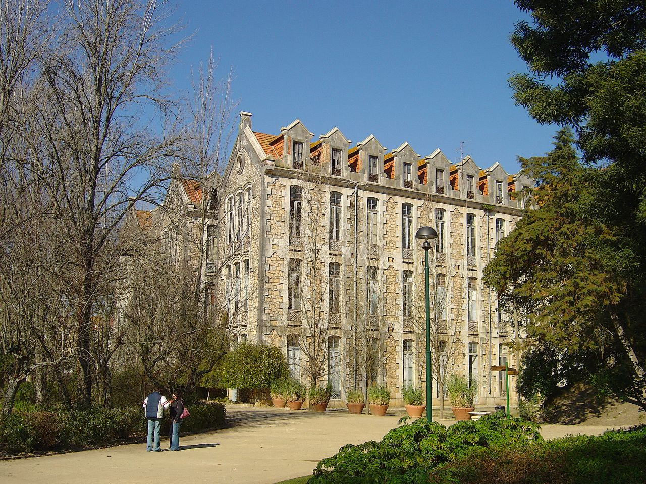 Parque D. Carlos I - Caldas da Rainha